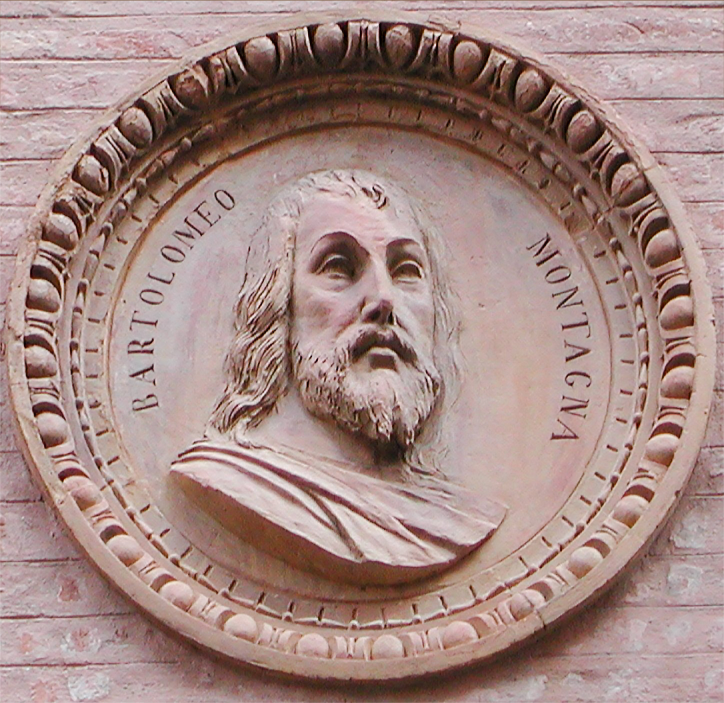 Ritratto di Bartolomeo Montagna (pittore di Vicenza) al Palazzo Thiene a Vicenza